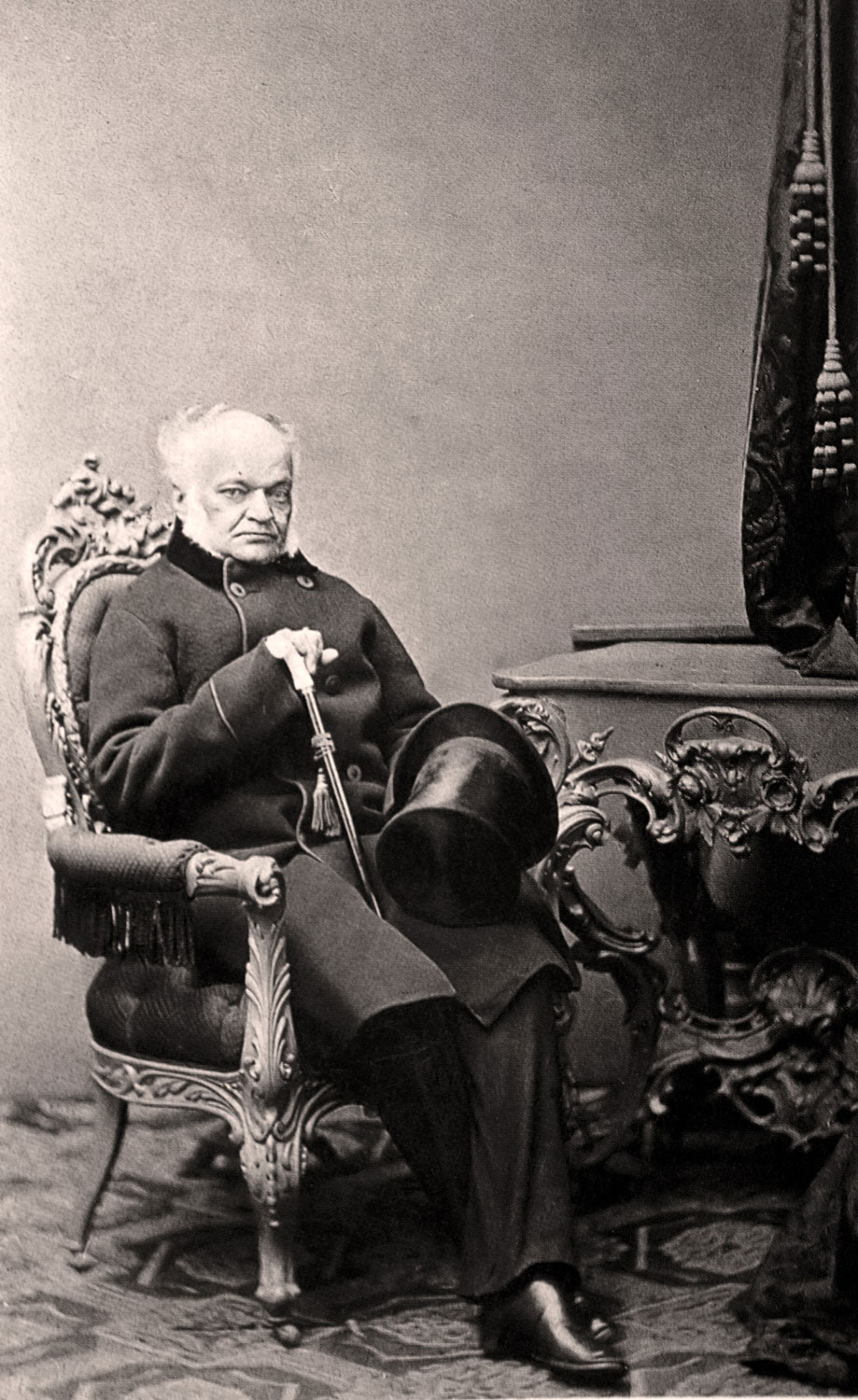 Беларуская (тарашкевіца): Фатаграфічны партрэт Яўстаха Тышкевіча (Jaŭstach Tyškievič)